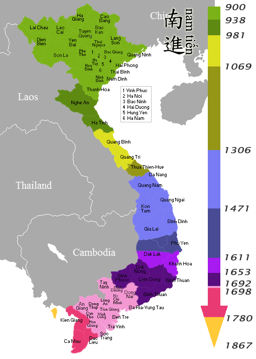 Nam tiến